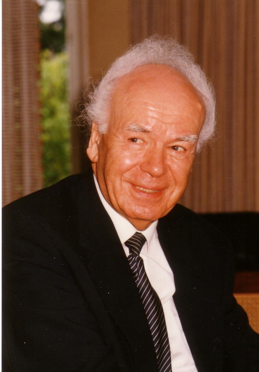 Brustbild Gerhard Otto